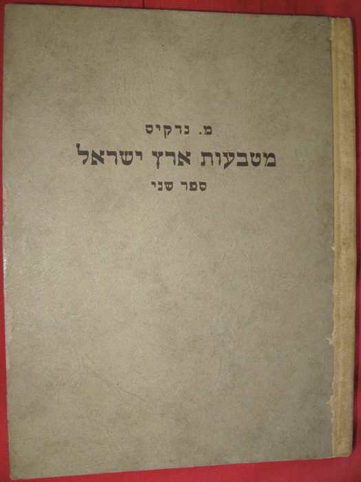 כריכת ספרו של מרדכי נרקיס "מטבעות ארץ ישראל - ספר שני (טביעת הנכרים)". זהו הכרך השני בסדרת ספריו של נרקיס אודות מטבעות ארץ ישראל.